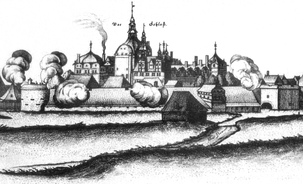 Ausschnitt einer Gesamtansicht von Celle von Nordwesten, in der Mitte das Schloss Celle mit seinem Wall. Aus den Bastionen steigt Pulverdampf auf von den Salutschüssen aufgrund der Begräbnisse der Herzöge Georg und Wilhelm.